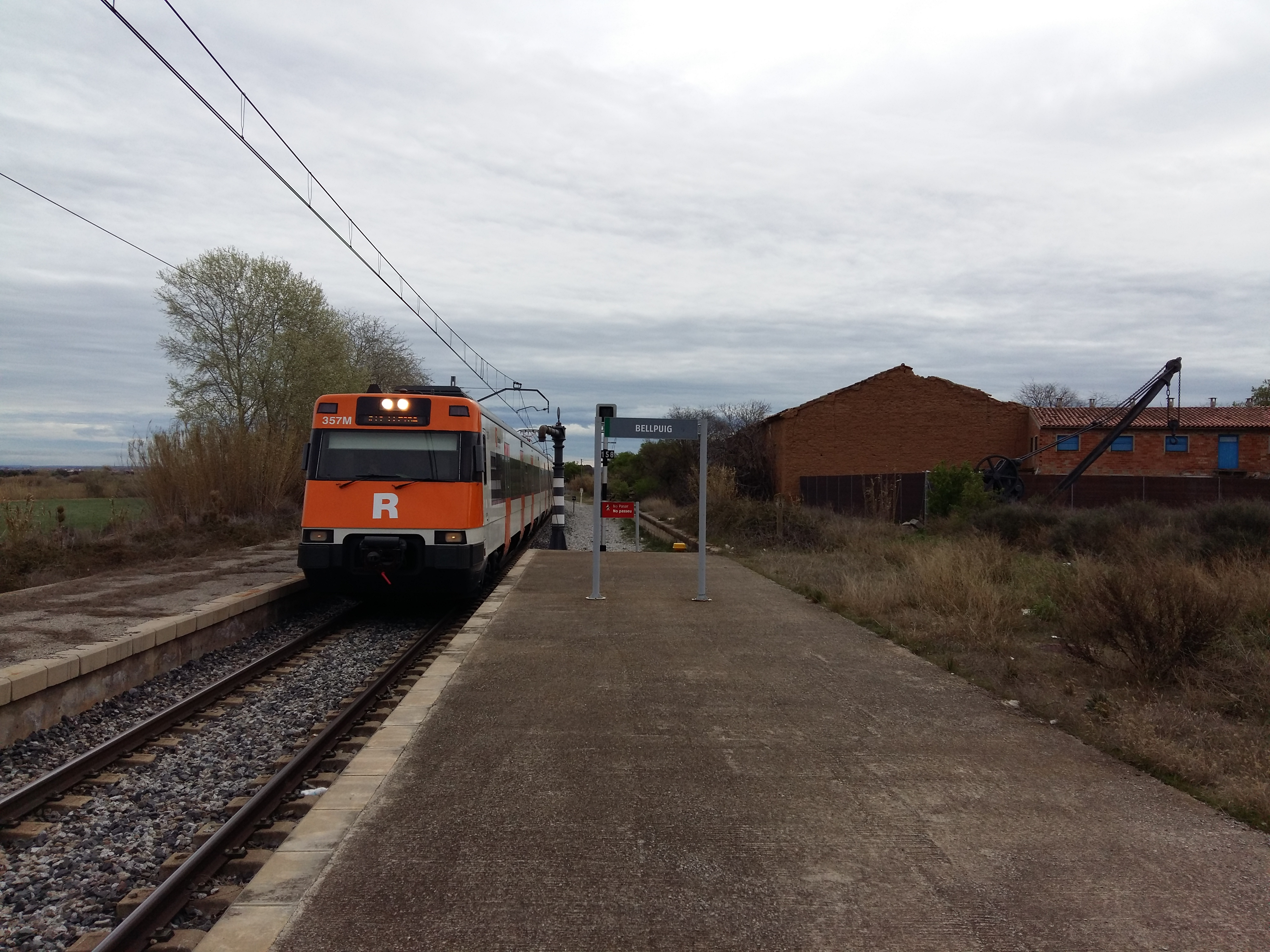 Gare de Bellpuig